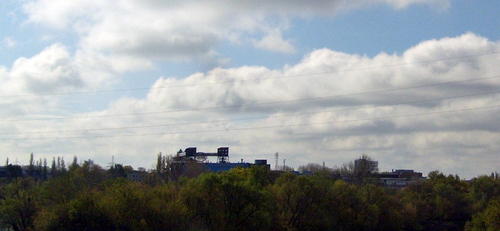 Stomil Poznań z mostu nad Wartą